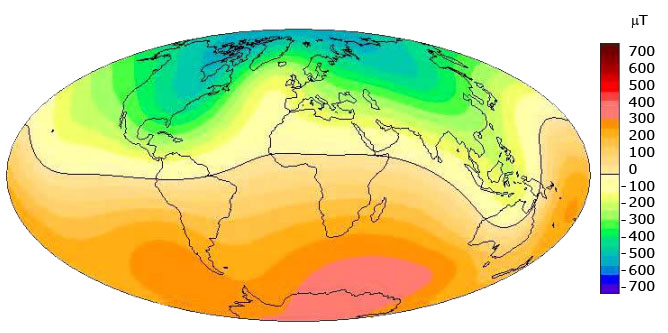 Mágneses tér radiális komponense